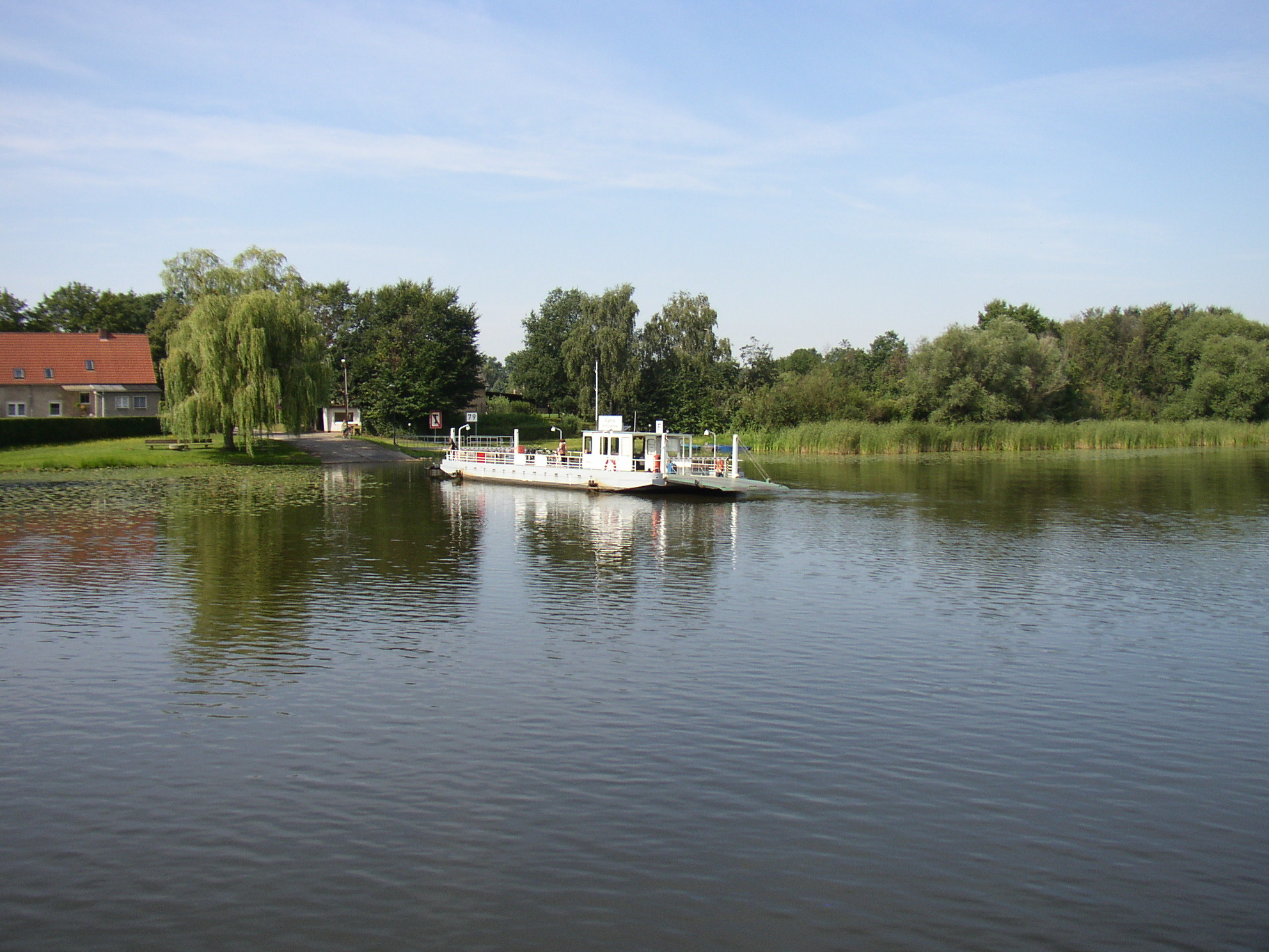 Seilfähre Pritzerbe